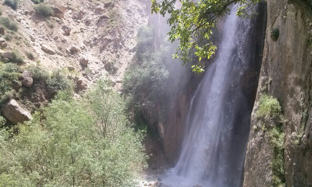 نمایی آبشار شاهاندشت